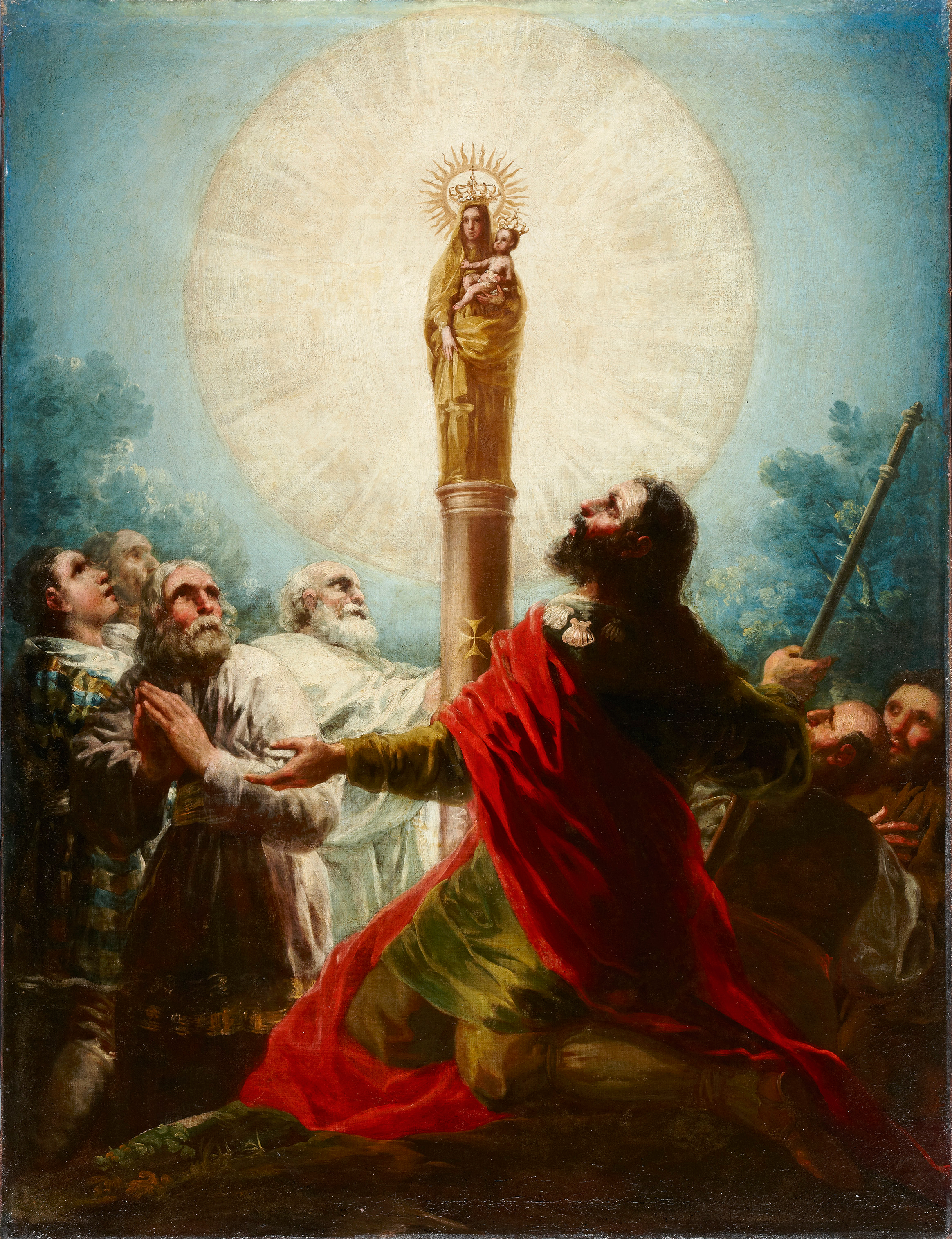 Francisco de Goya, El apóstol Santiago y sus discípulos adorando a la Virgen del Pilar, 1775-1780, 107 x 80. Obra perteneciente a una colección privada madrileña y depositada en el Museo de Zaragoza.